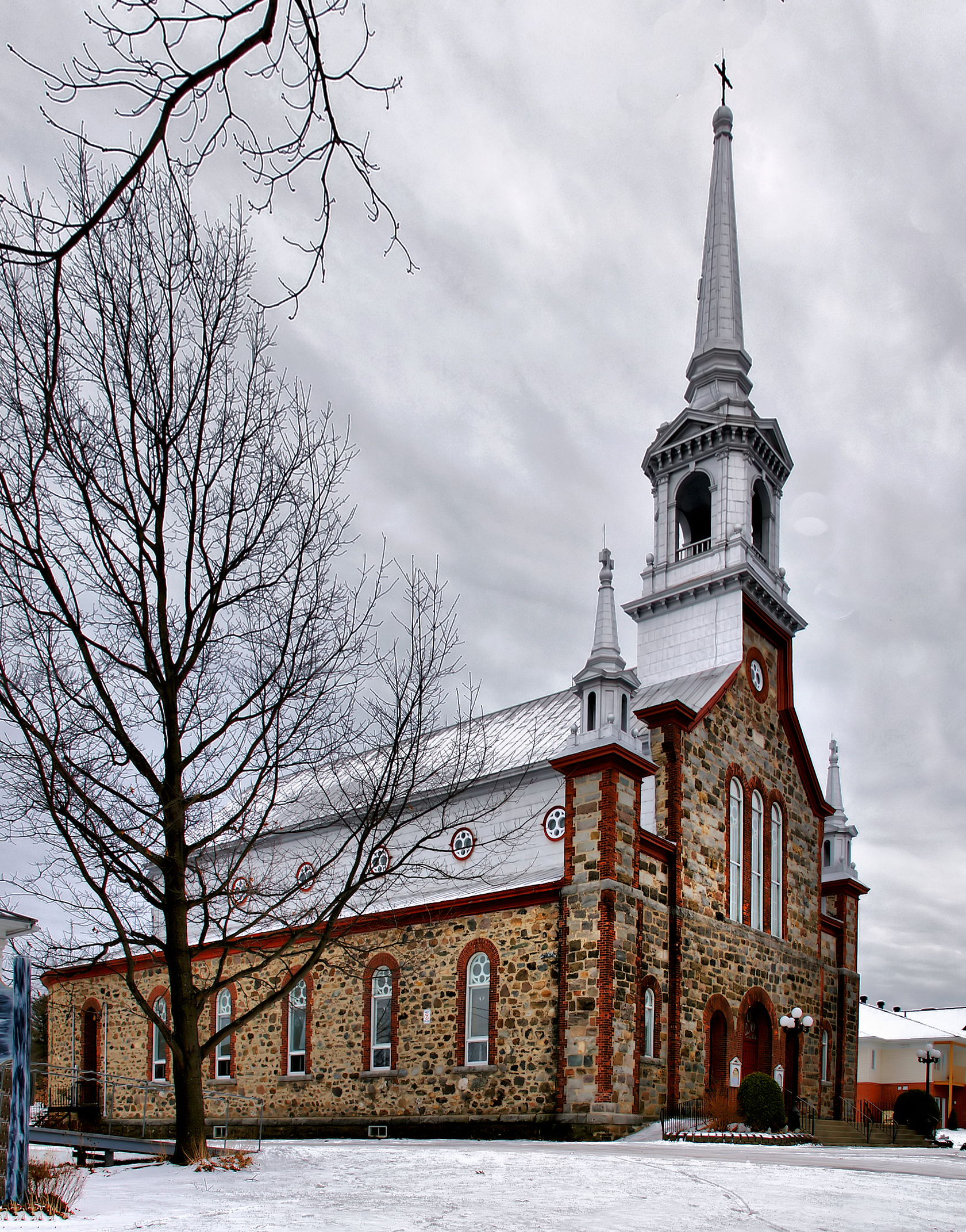 Racine - Eglise paroissiale Saint-Théophile